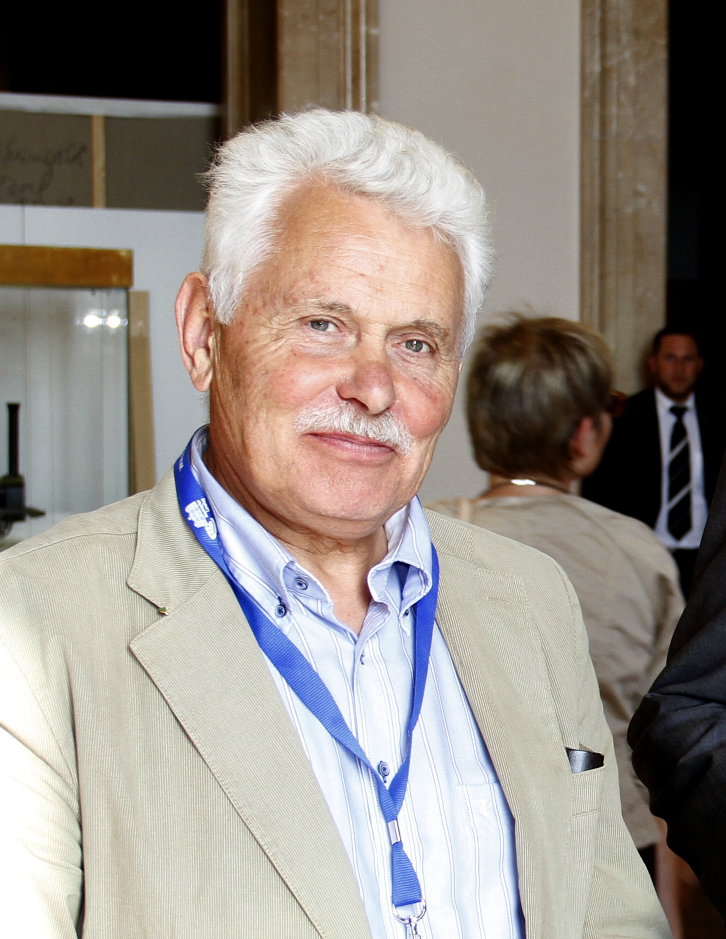 Peter Claus Hartmann im Foyer des Bayerischen Landtags